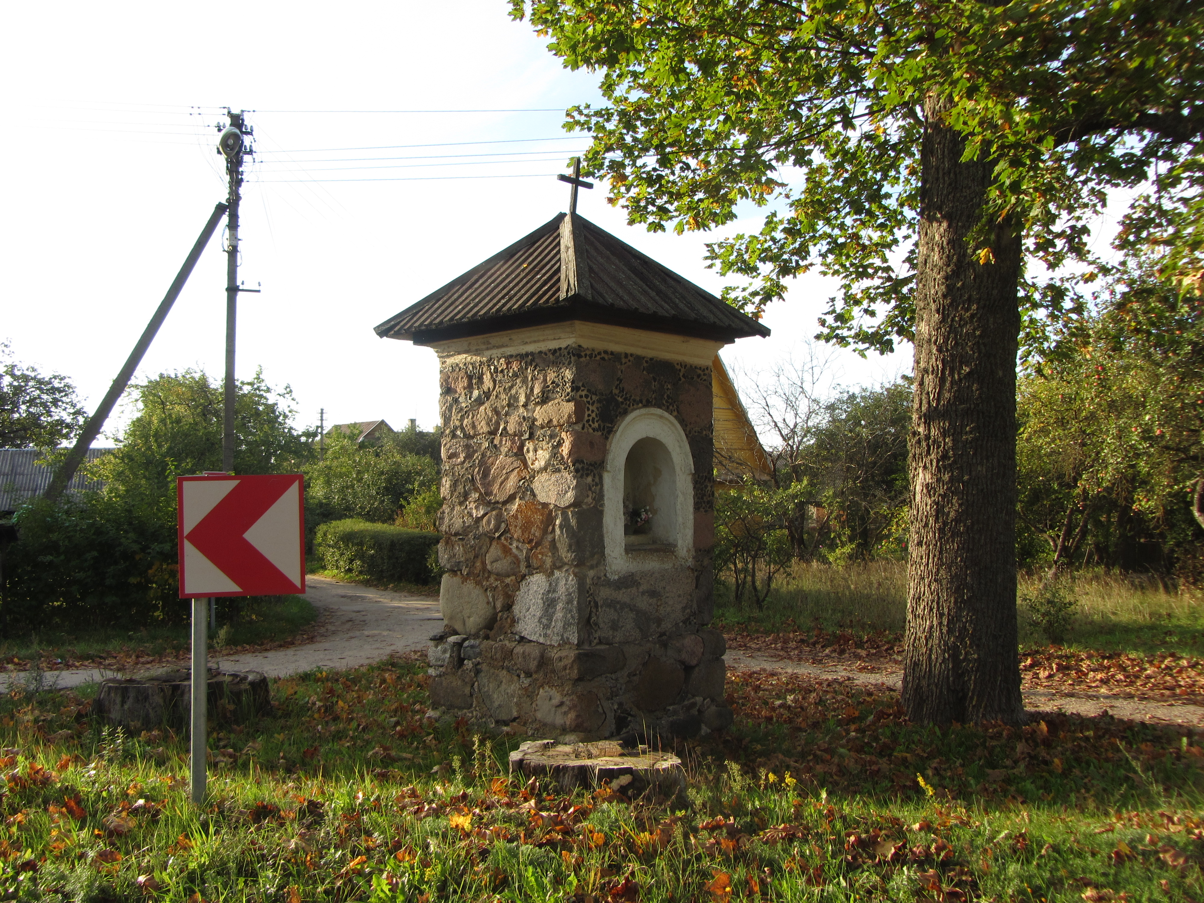 Šventa, Lithuania